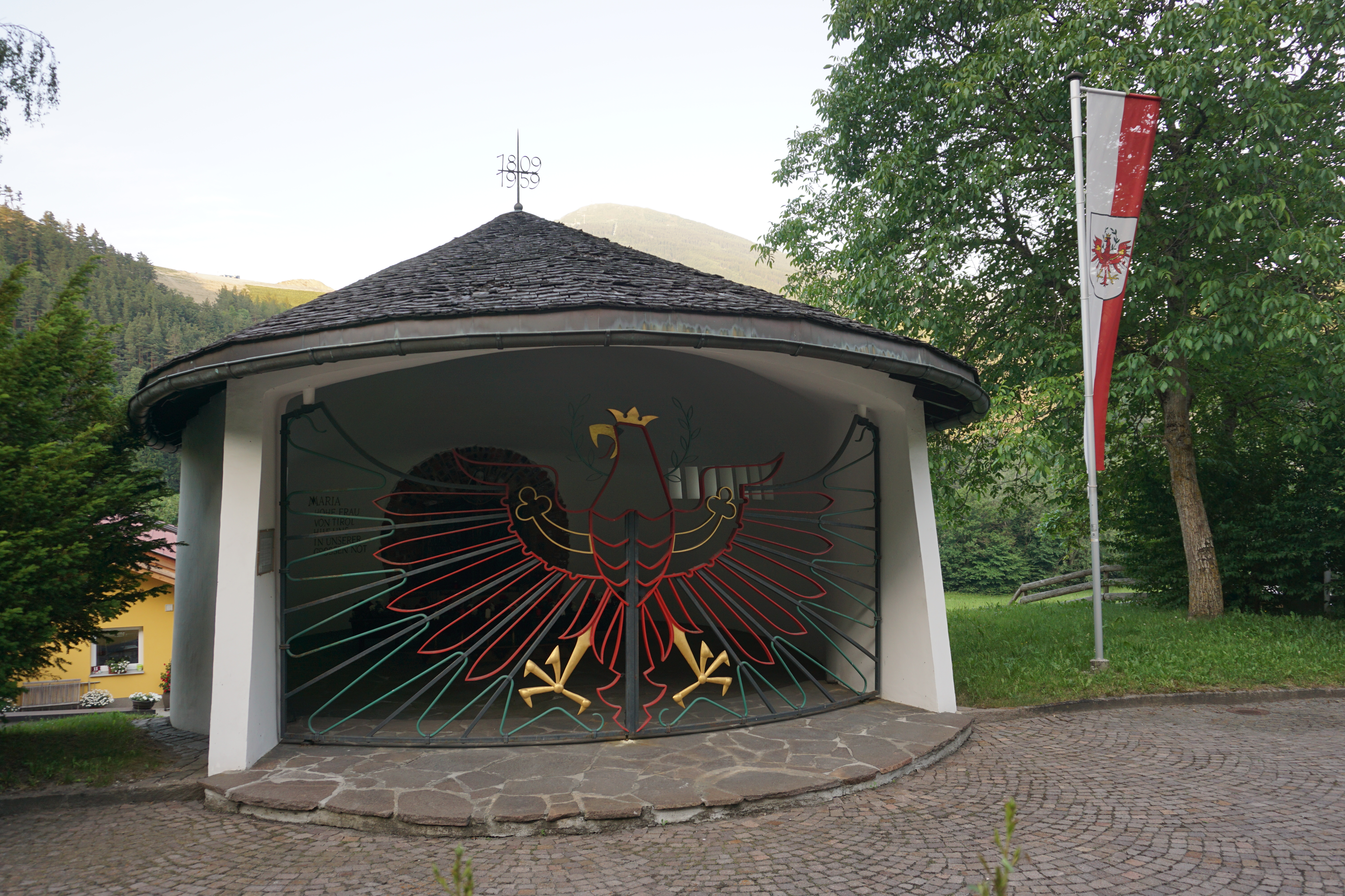 Gedächtniskapelle Andreas Hofer in Unterberg Unterbergkapelle This media shows the remarkable cultural object in the Austrian state of Tyrol listed by the Tyrolean Art Cadastre with the ID 35759. (on tirisMaps, pdf, more images on Commons, Wikidata)